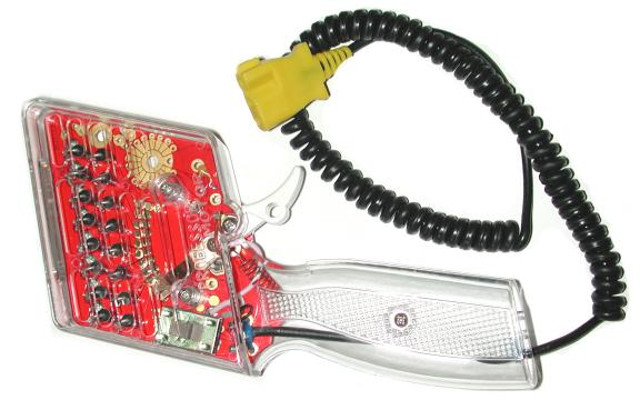 Mando digital.